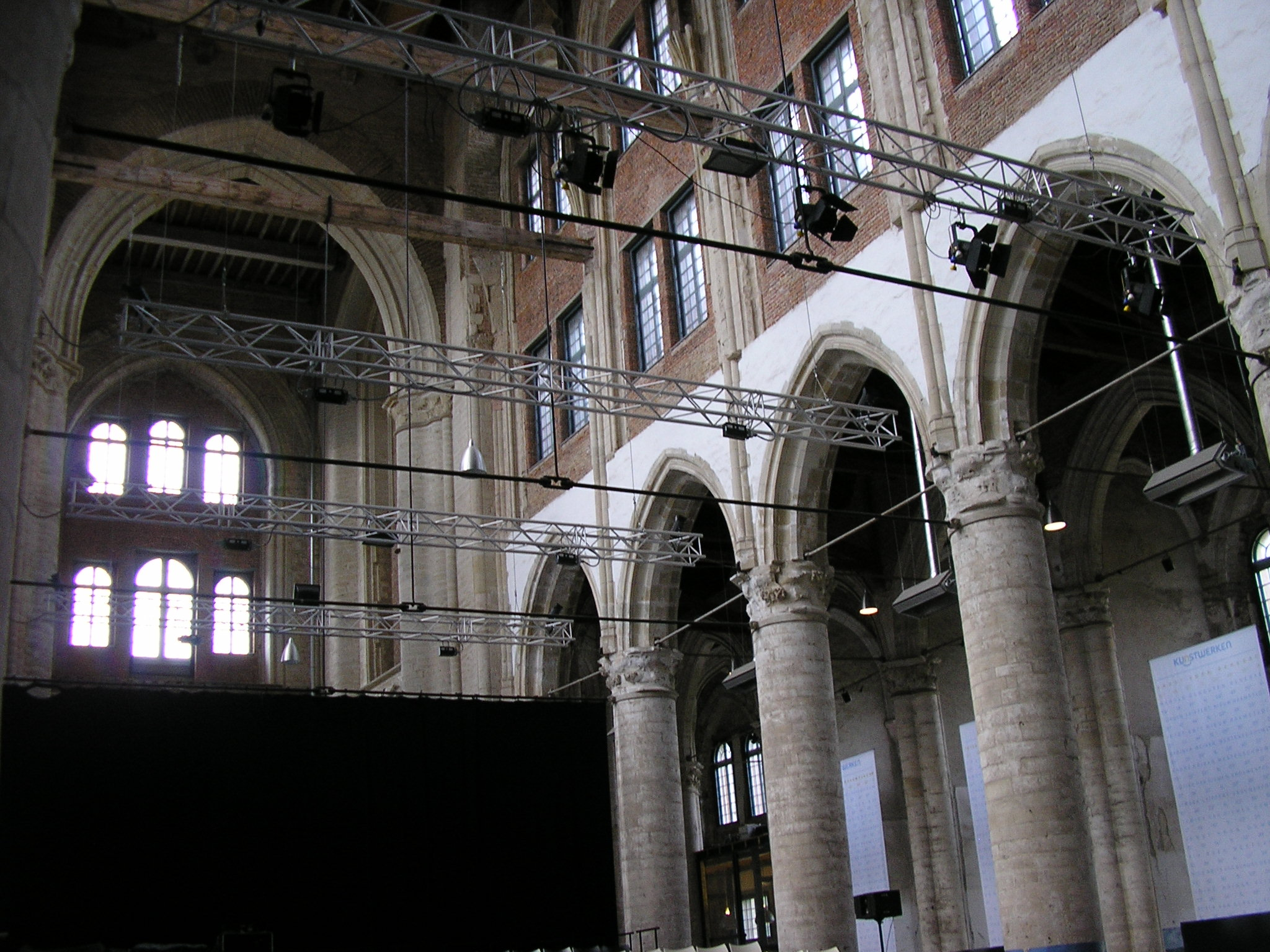 Zicht op een deel van het interieur van de Grote Kerk (Veere)